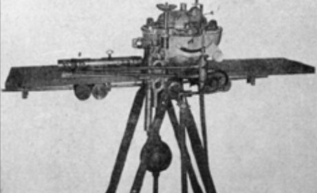 Vágó Pál szervomotoros repülőgép stabilizátora